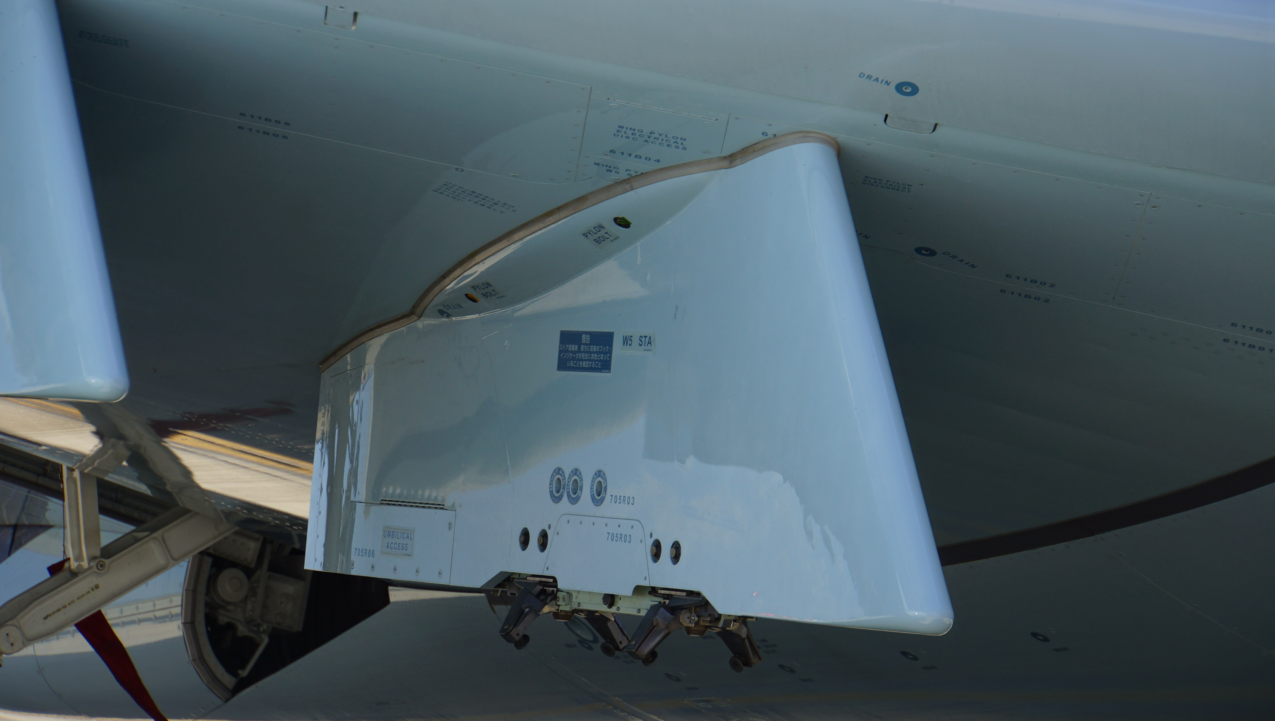 海上自衛隊 P-1哨戒機（5506号機） パイロン。 14年9月14日 岩国航空基地にて。